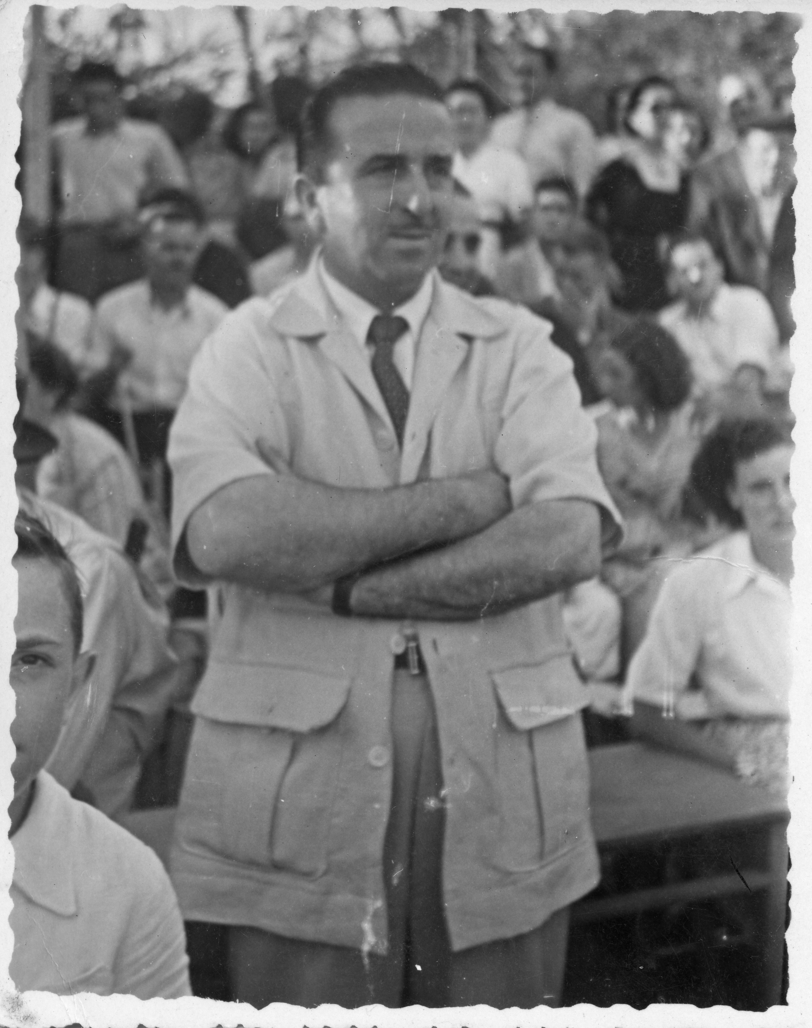 Jaume Buch i Vallverdú l'any 1945. AMM, fotografia 14926.